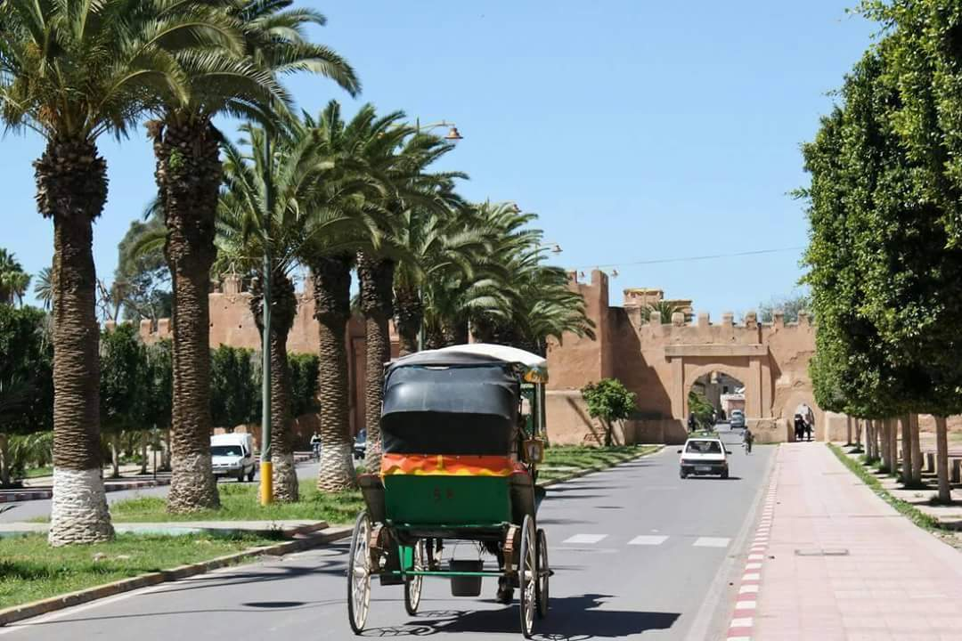 شارع في مدينة تارودانت